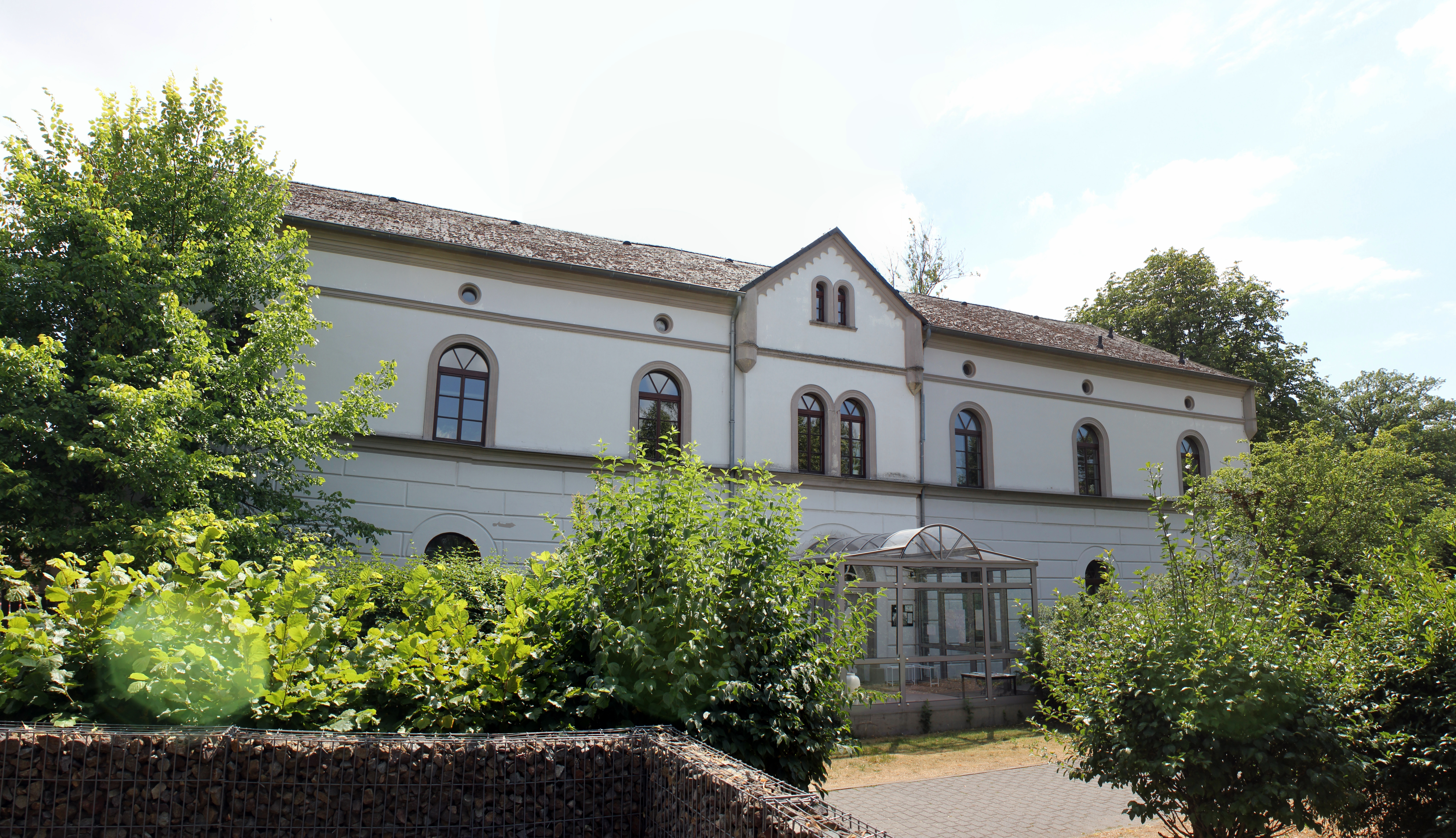 Hospital Bülstringer Straße 30 Haldensleben